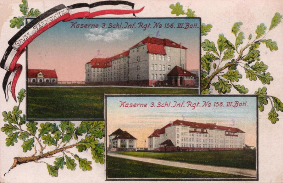 Koszary 3 Batalionu 156 Pułku Piechoty (3 Śląskiego) w Tarnowskich Górach. Pocztówka z ok. 1916